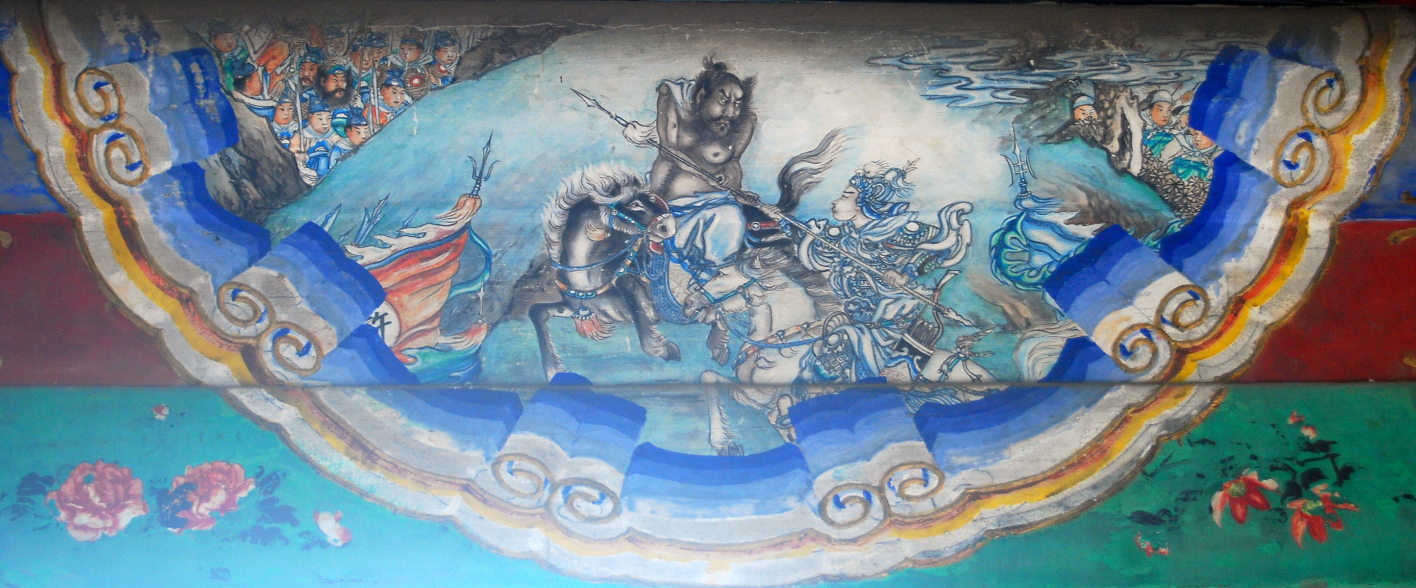 颐和园长廊上的彩绘：许褚战马超